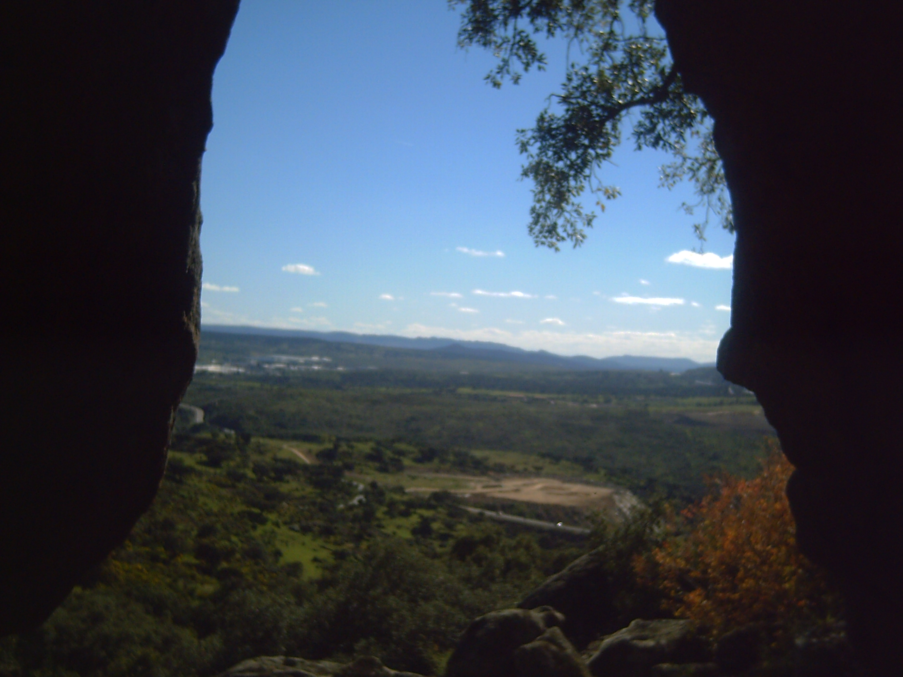 Vistas dendi la Cueva el Boquiqui